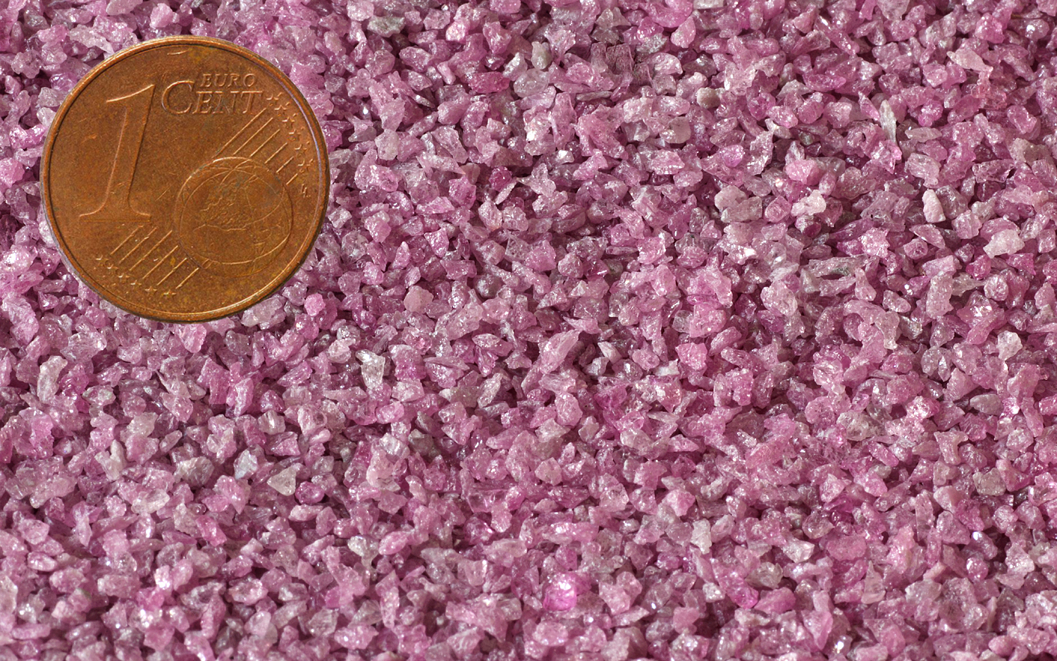 Körniger Elektrokorund für industrielle Zwecke